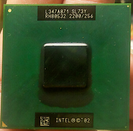 同じ開発コード名だがデスクトップ用の倍のキャッシュを搭載